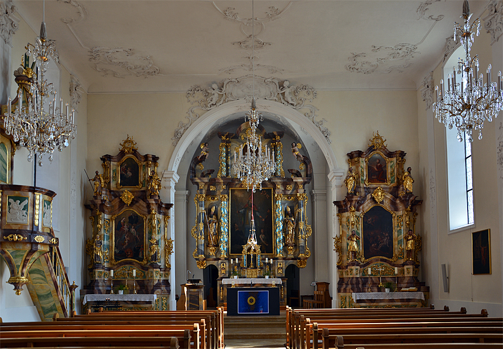 Pfarrkirche St. Martin in Egerkingen, Inneres